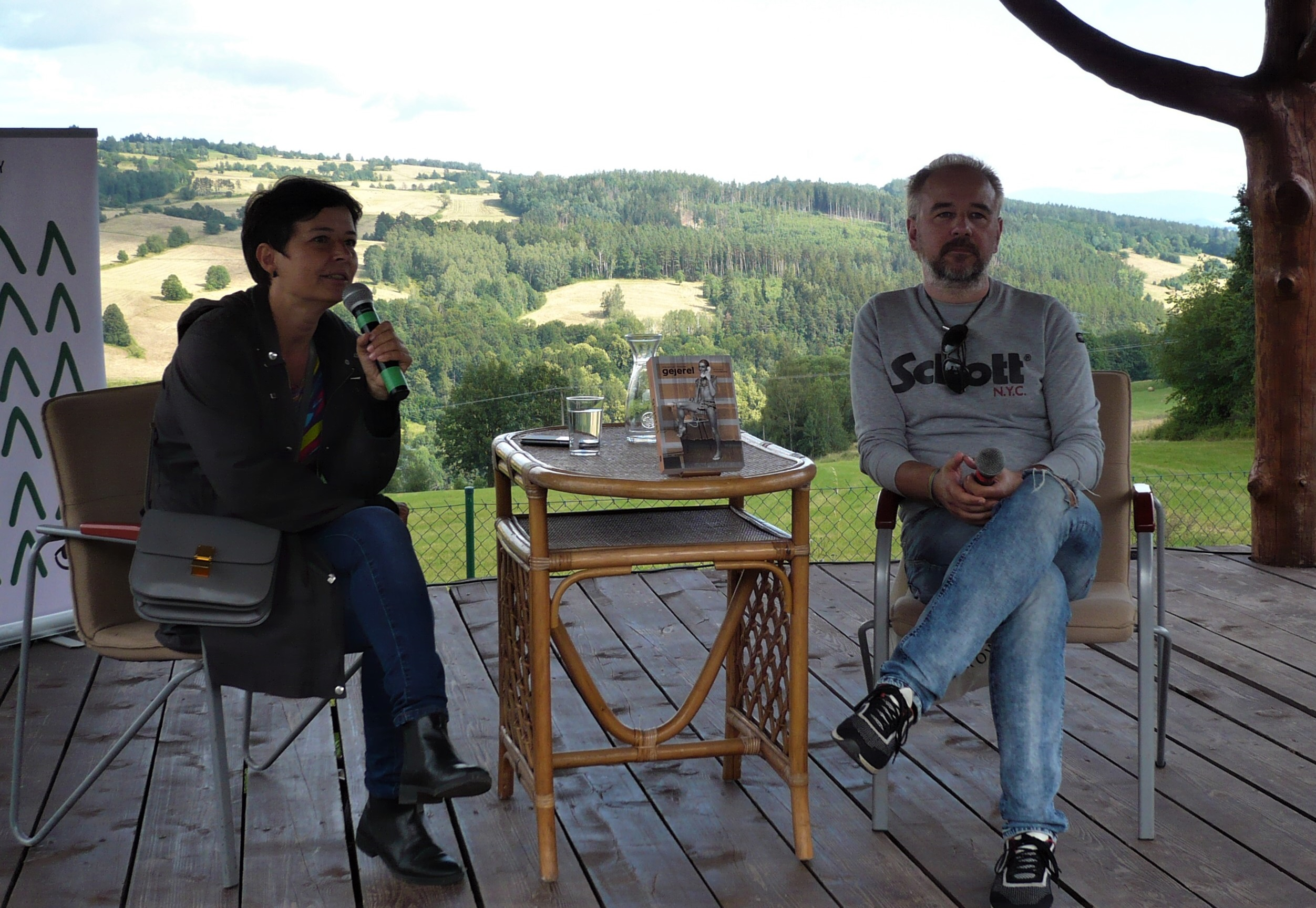 Krzysztof Tomasik, VI Festiwal Góry Literatury, 17.07.2020